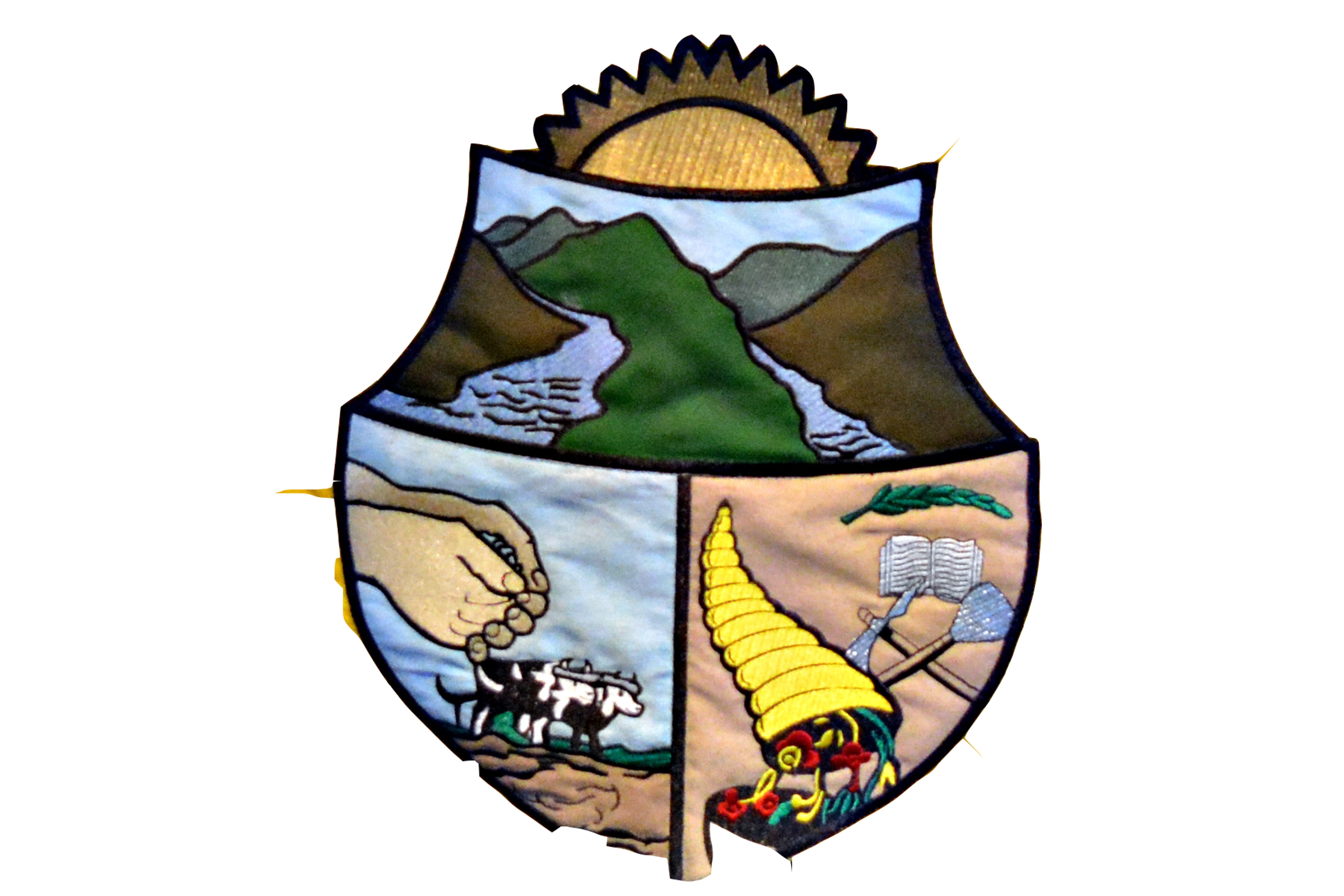 ESCUDO San Joaquín Ecuador